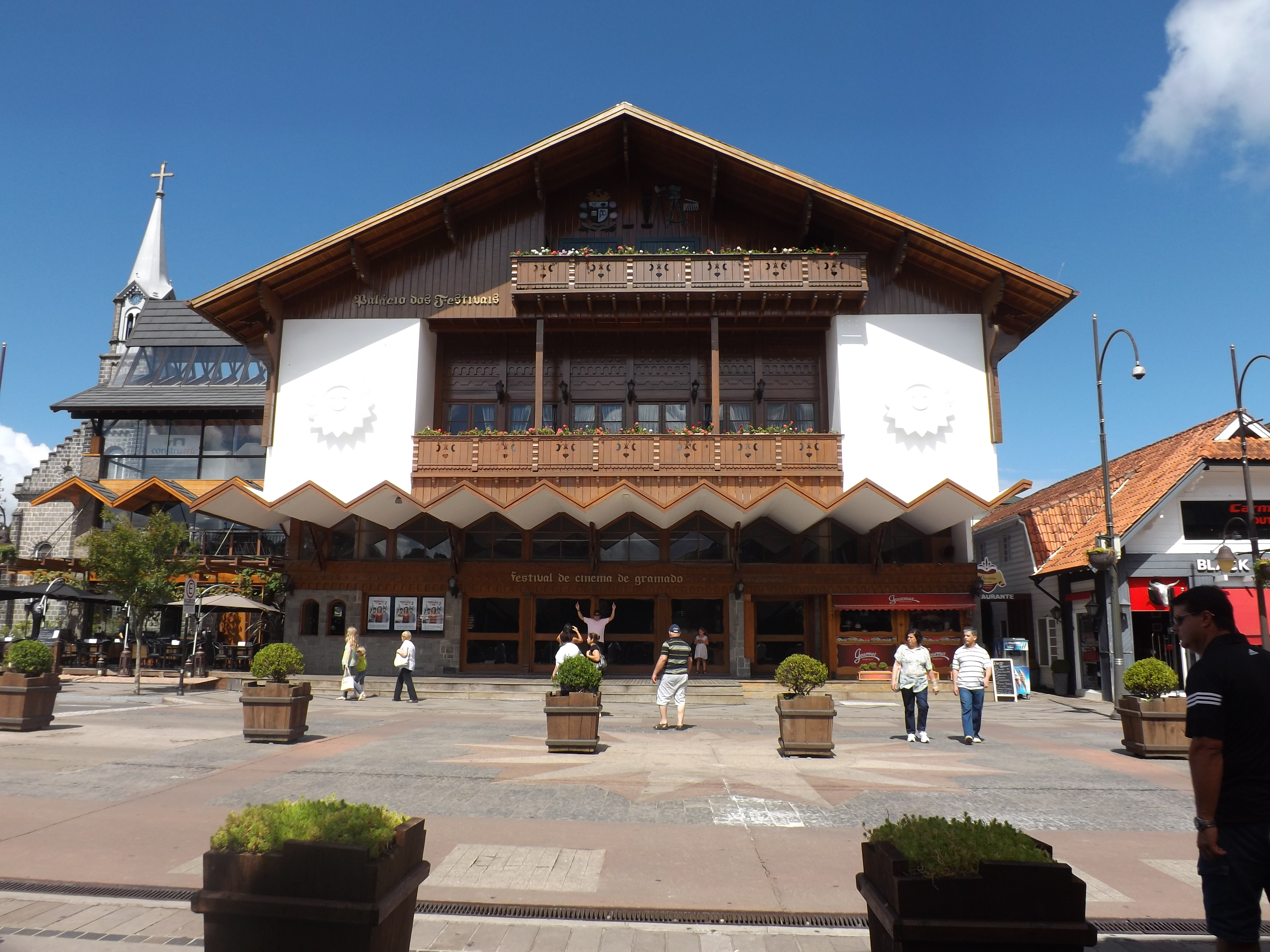 Palacio dos festivais - Gramado